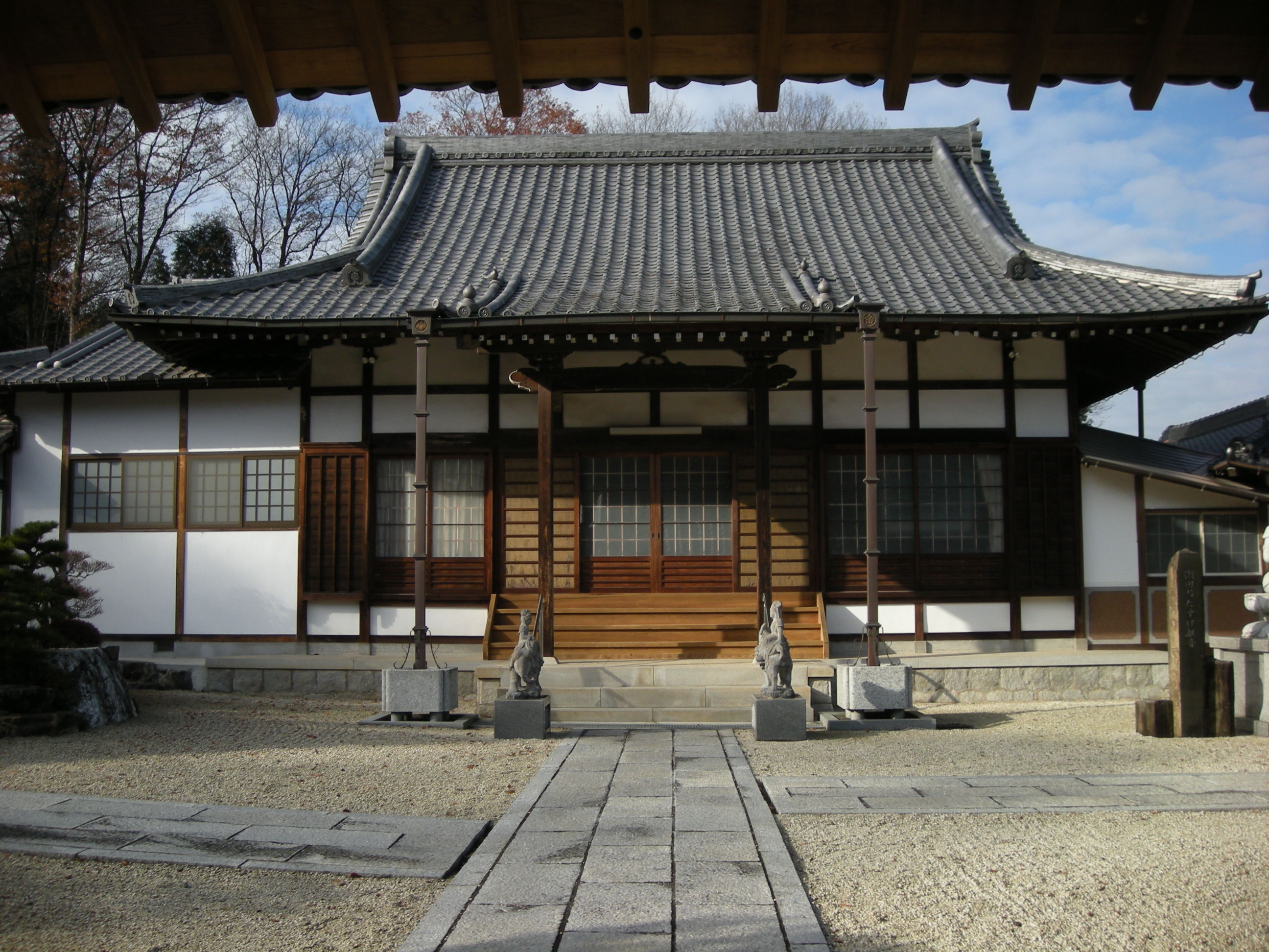 Tenryuji temple（天竜寺（可児市））